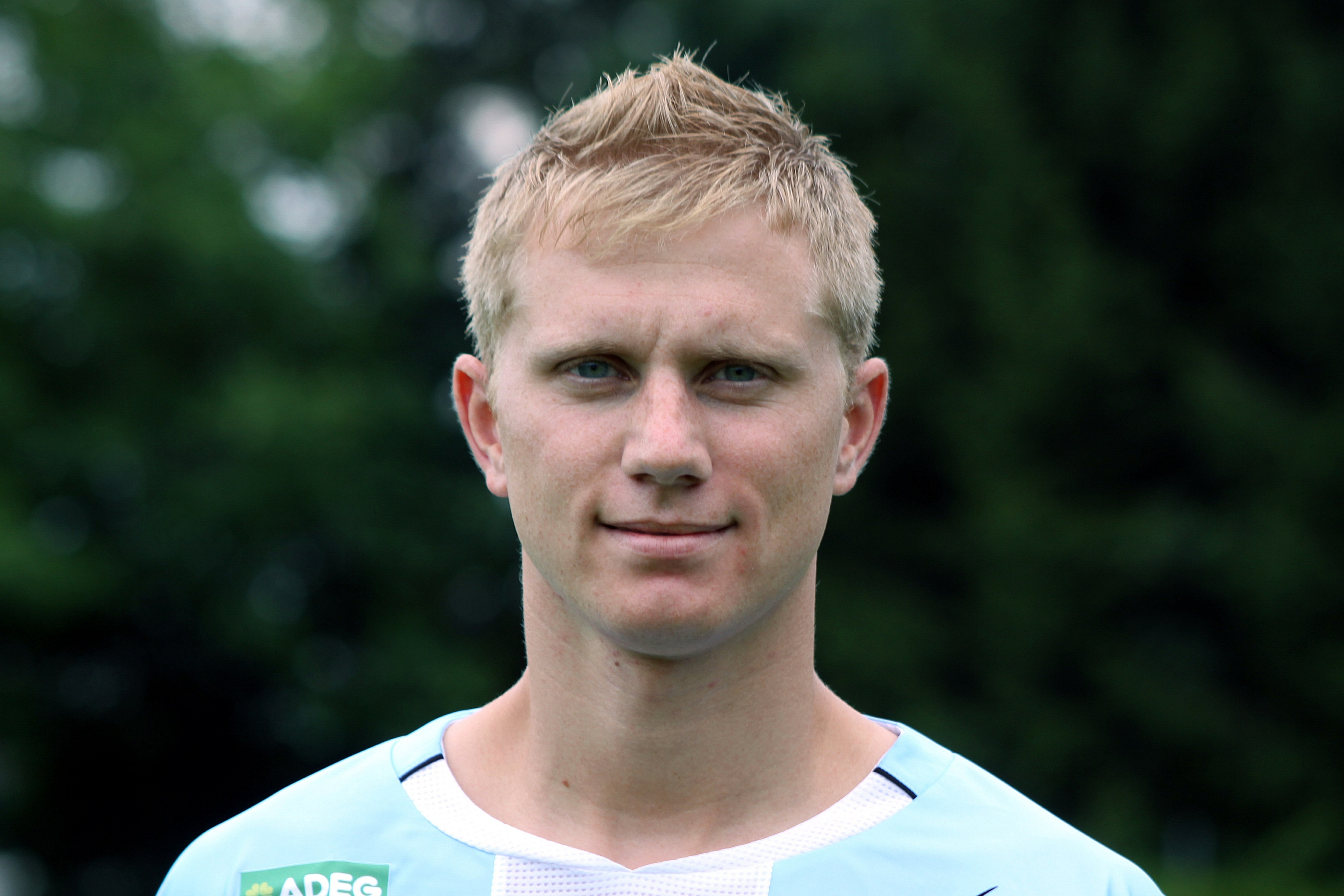 Nejc Omladic - TSV Hartberg (2)